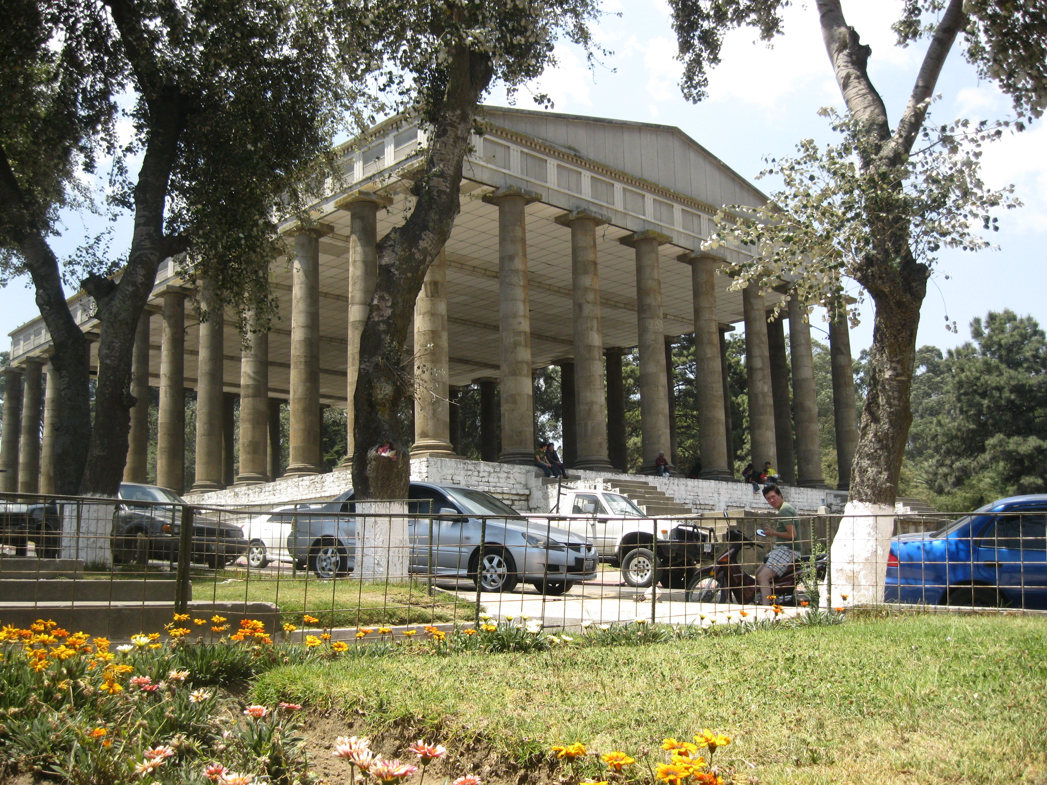 Templo a Minerva en la Ciudad de Quetzaltenango, Guatemala